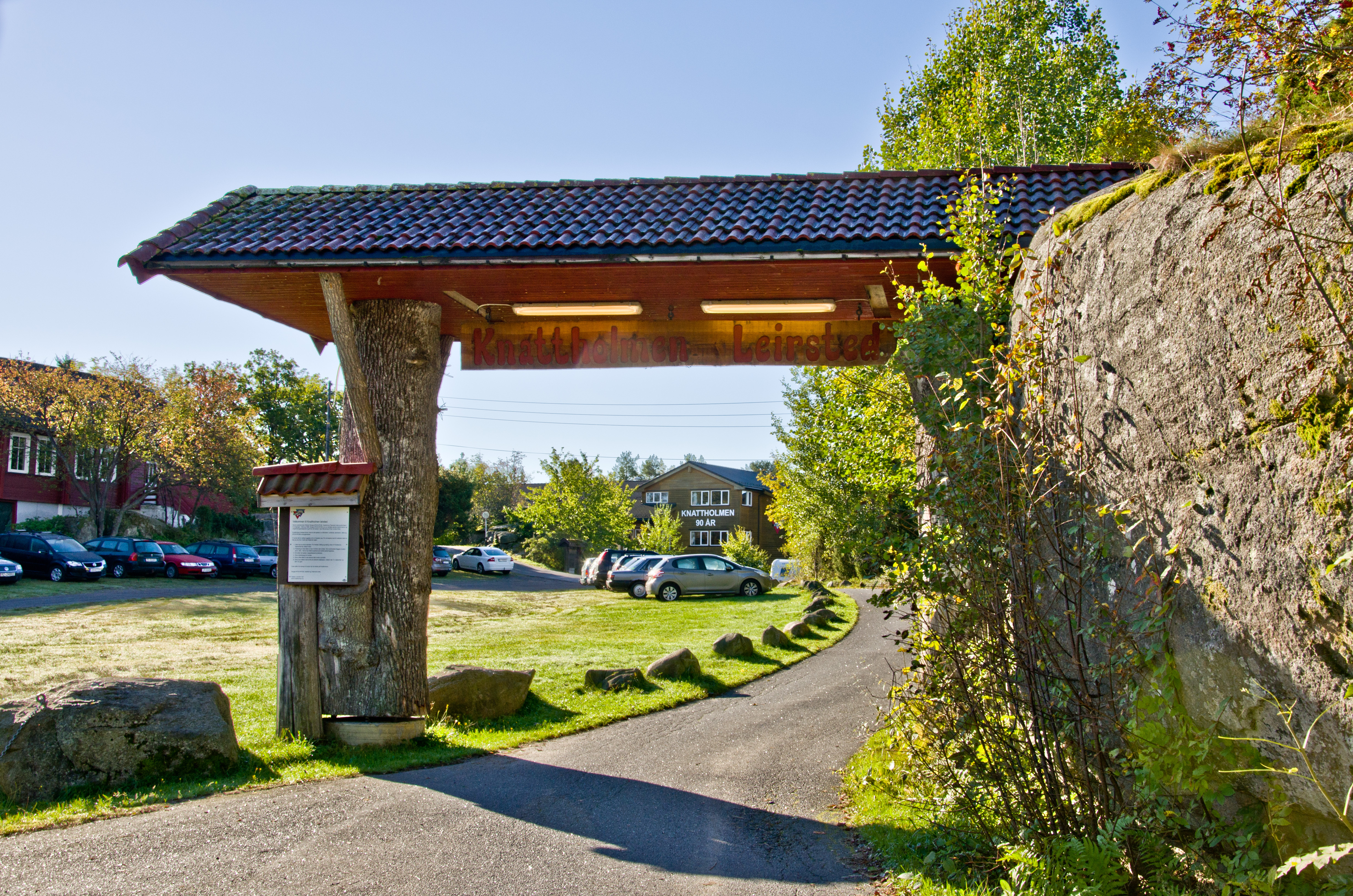 Inngangsportalen til Knattholmen leirsted, Natholmen, Sandefjord, Vestfold, Norge